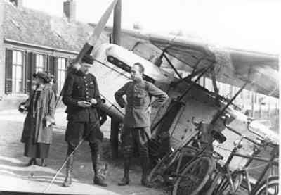 Noodlanding tijdens een proefvlucht boven Arnhem. Op de foto staan Elt. J.G. Sissingh en Sgt Vl F.M.W.A. van den Berg